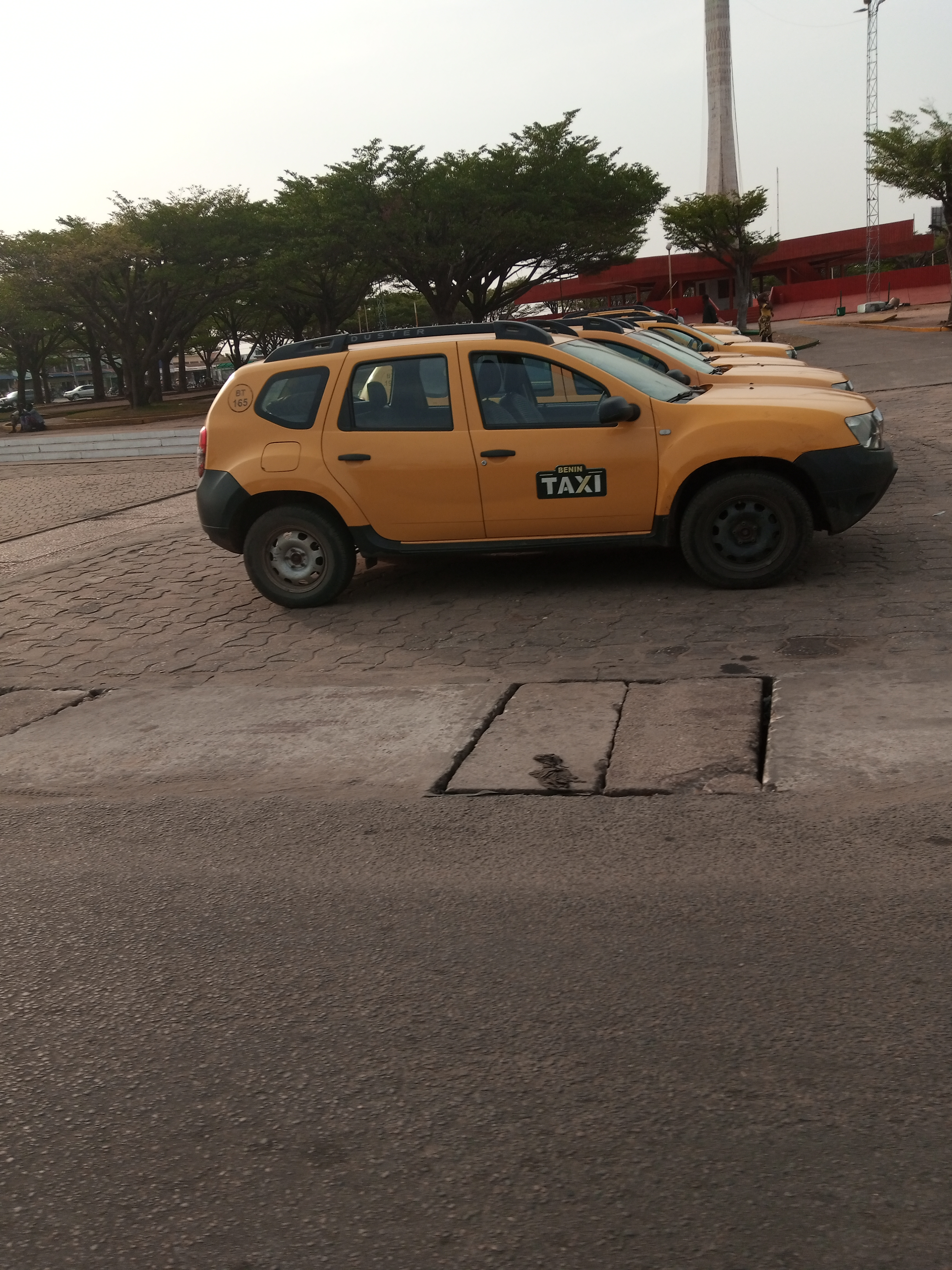 Benin taxi This is an image with the theme "Africa on the Move or Transport" from: Benin